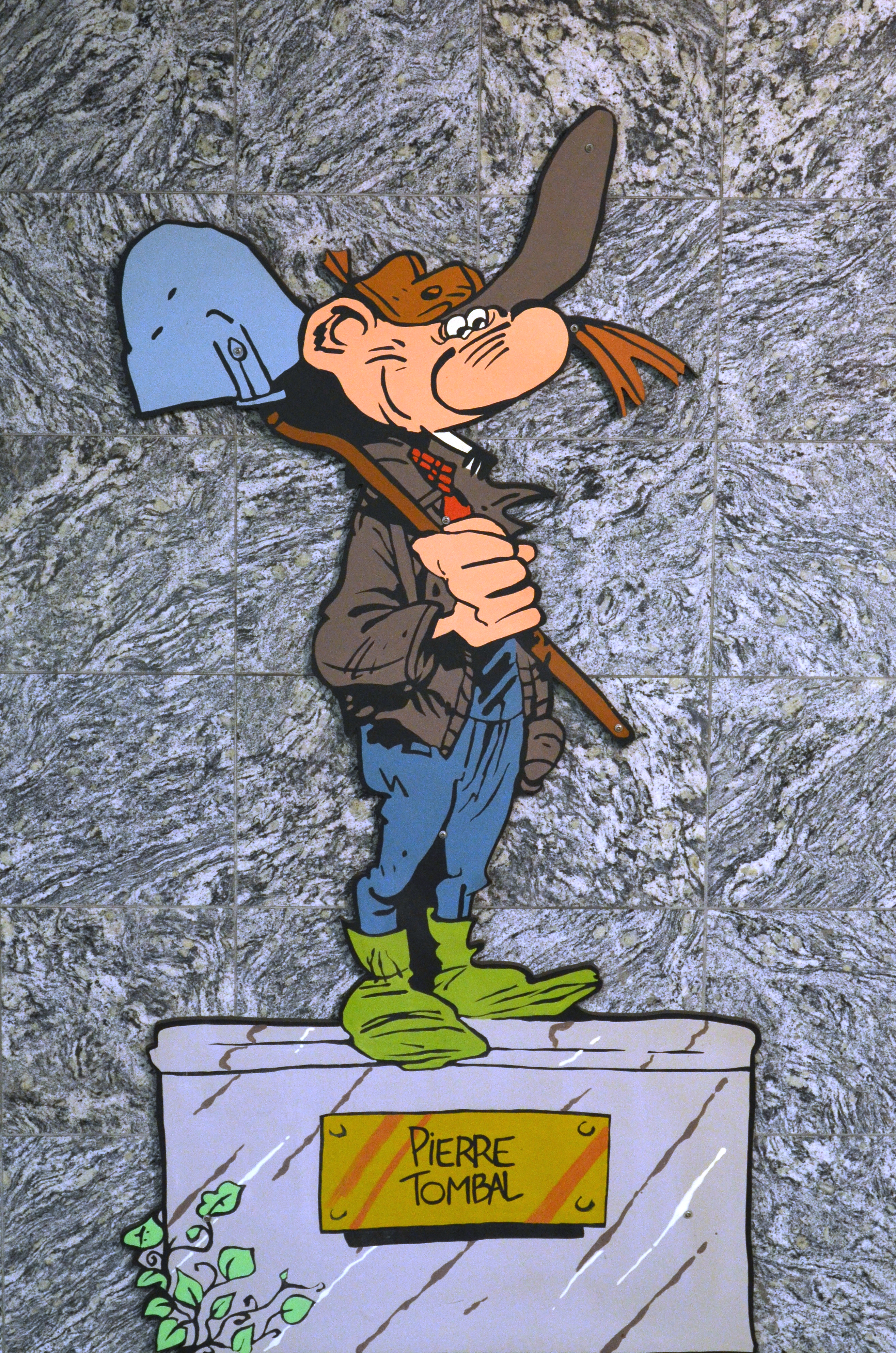 Charleroi (Belgique) - Station Janson du métro léger. Pierre Tombal de Hardy (dessin) et Raoul Cauvin (scénario).